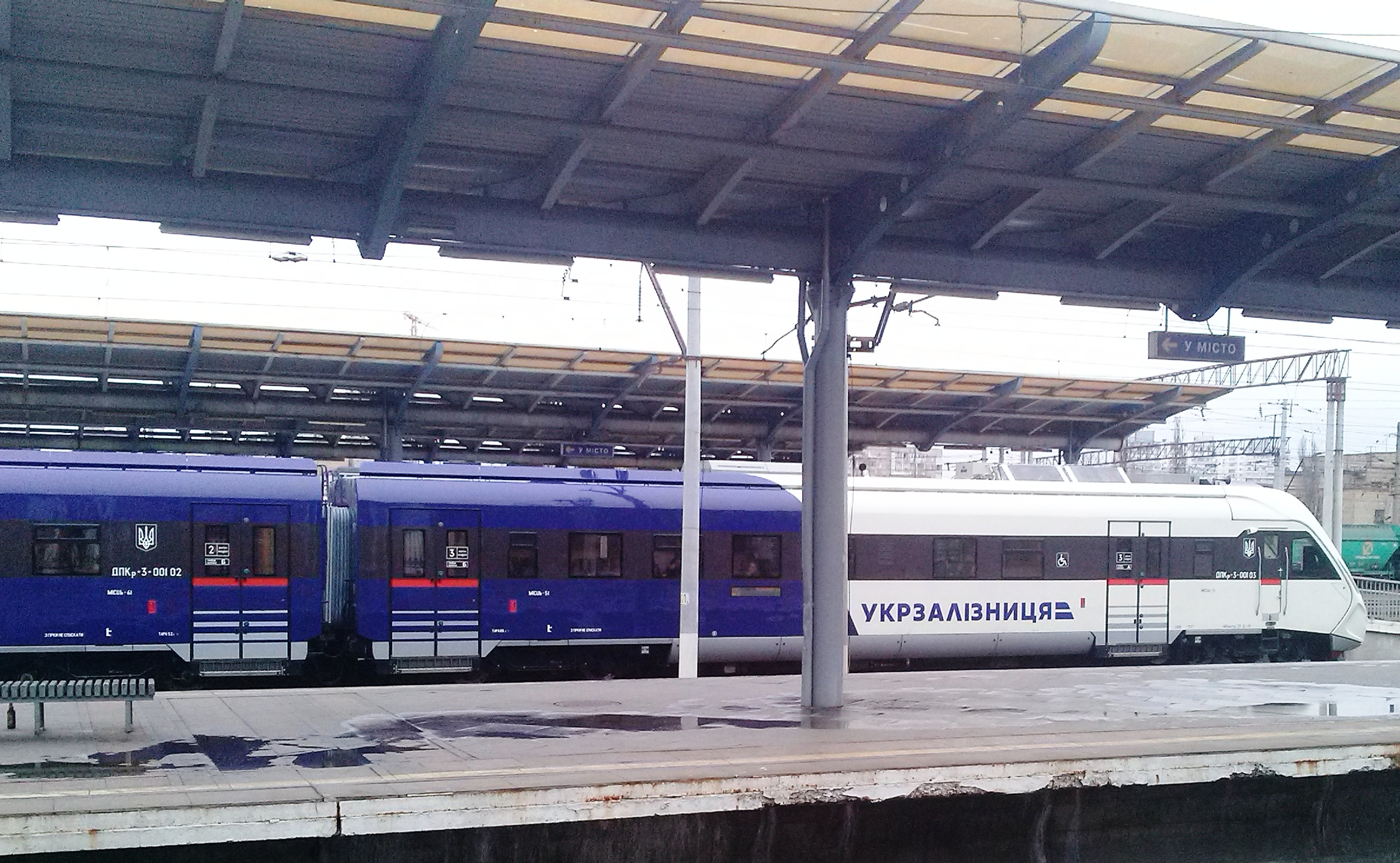 дизель-поезд "Борисполь-Экспресс" ДПКр-3 на станции Дарница